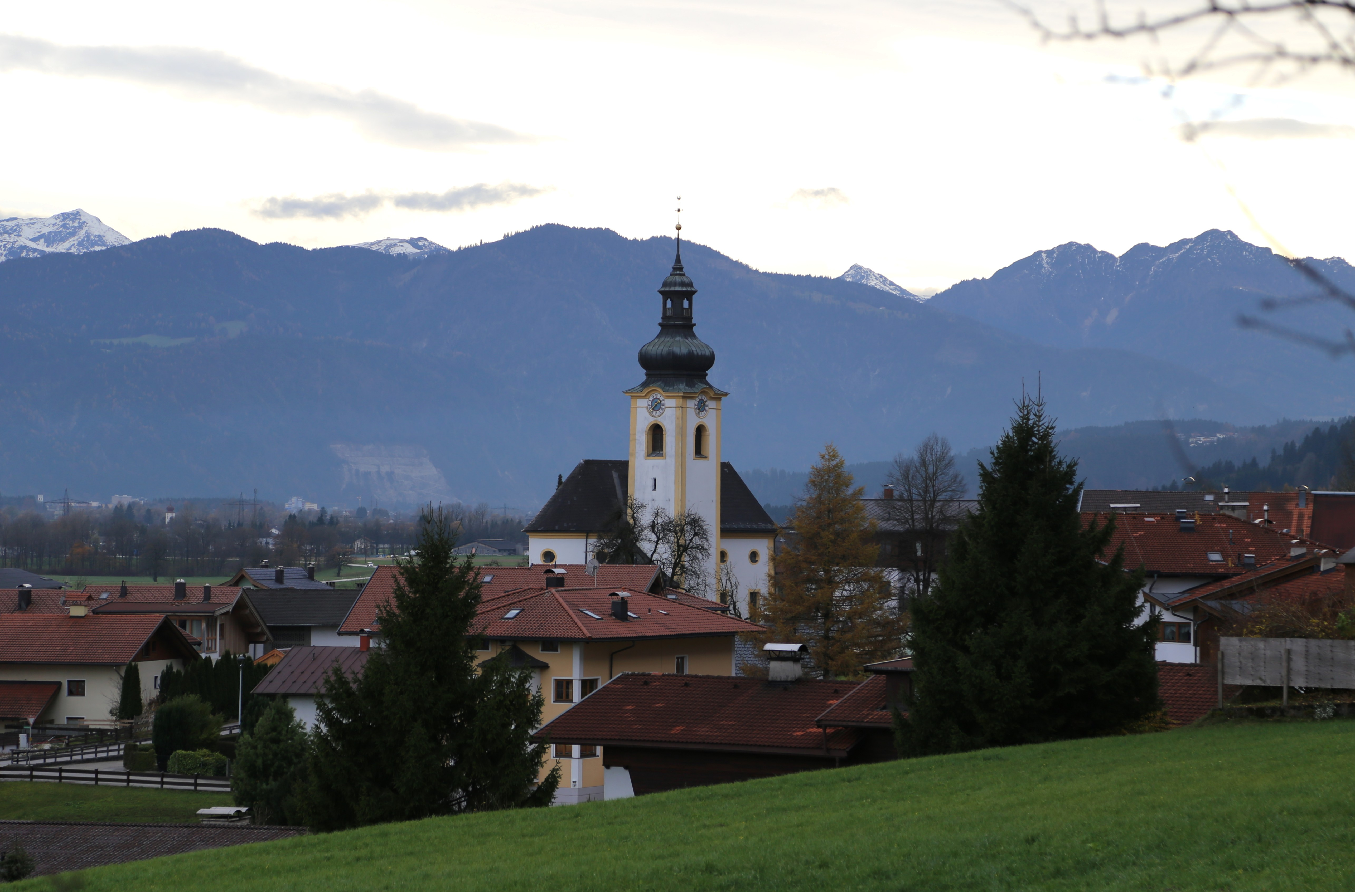 Kath. Pfarrkirche St. Ursula, Unterlangkampfen